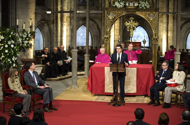 El Lehendakari Patxi López participa en el acto conmemorativo del Año Xacobeo 2010 en la iglesia colegiata de Santa María en Roncesvalles.